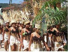 Festividades de San Isidro